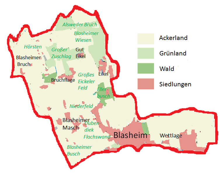 Bodennutzung des Stadtteils Blasheim